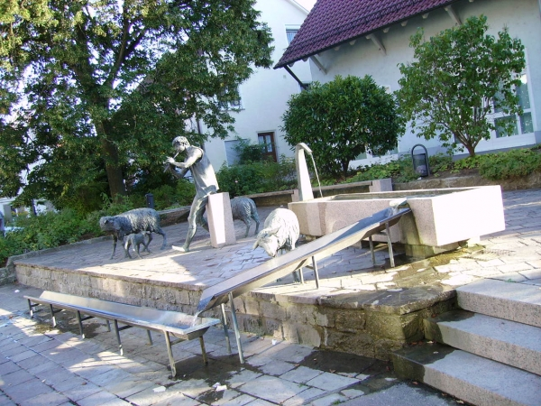 Schäferbrunnen in Zell unter Aichelberg